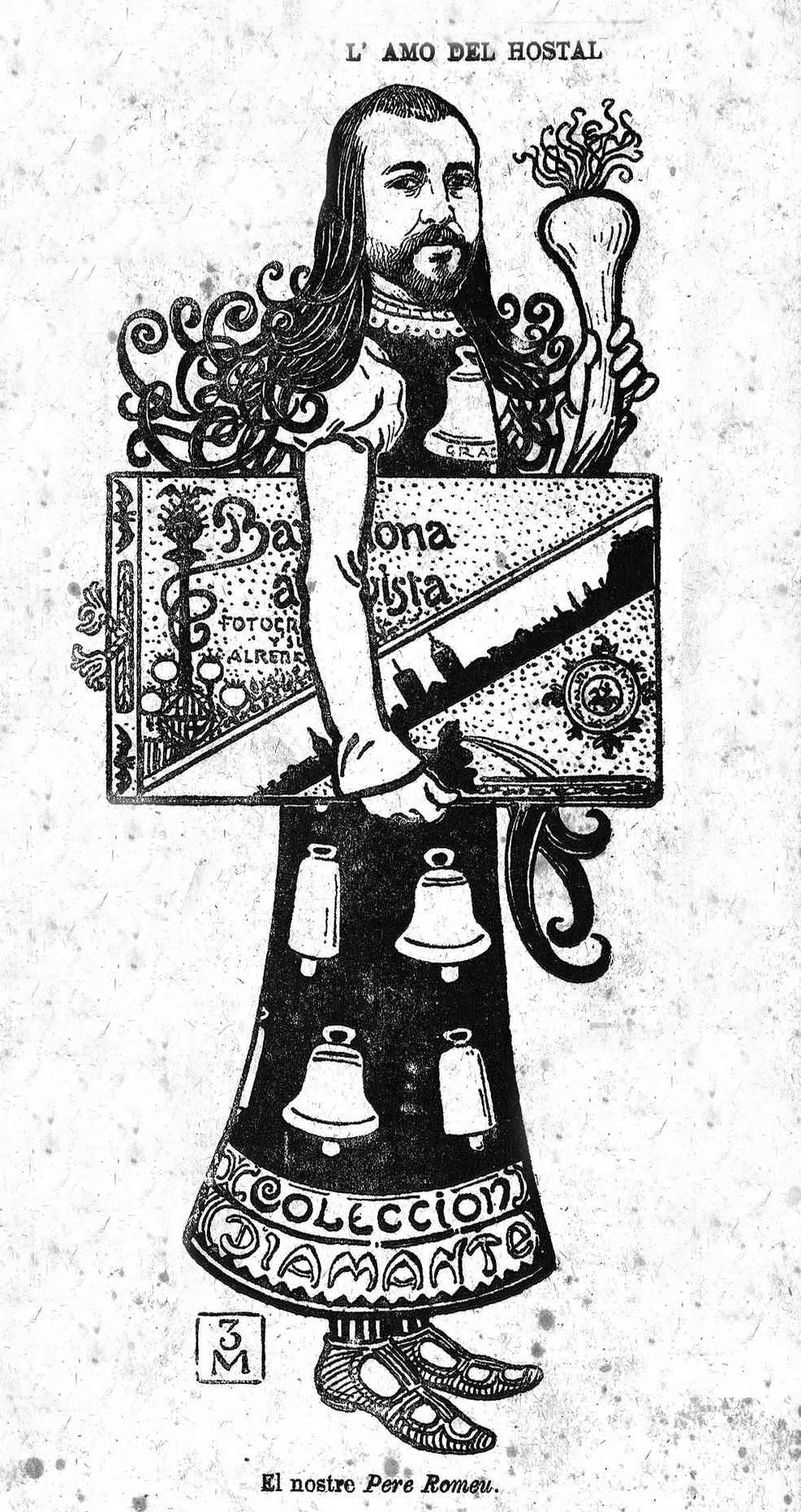 El nostre Pere Romeu.